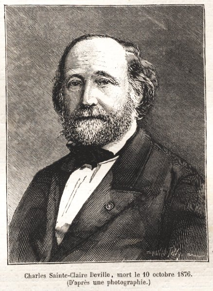 Portrait d'après photographie de Charles SAINTE-CLAIRE DEVILLE